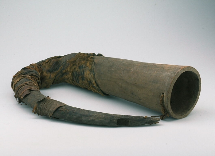 De klanktrechter van deze 'natuurlijke' hoorn is van hout en de rest, waarin zich het aanblaasgat bevindt, van bokkenhoorn. Het gedeelte van bokkenhoorn is omwikkeld met repen leer.